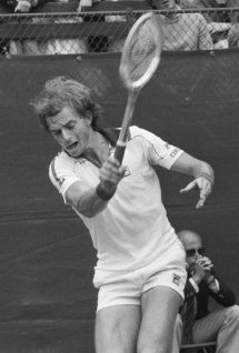 Heinz Günthardt lors de la finale du tournoi d'Hilversum, en juillet 1981.